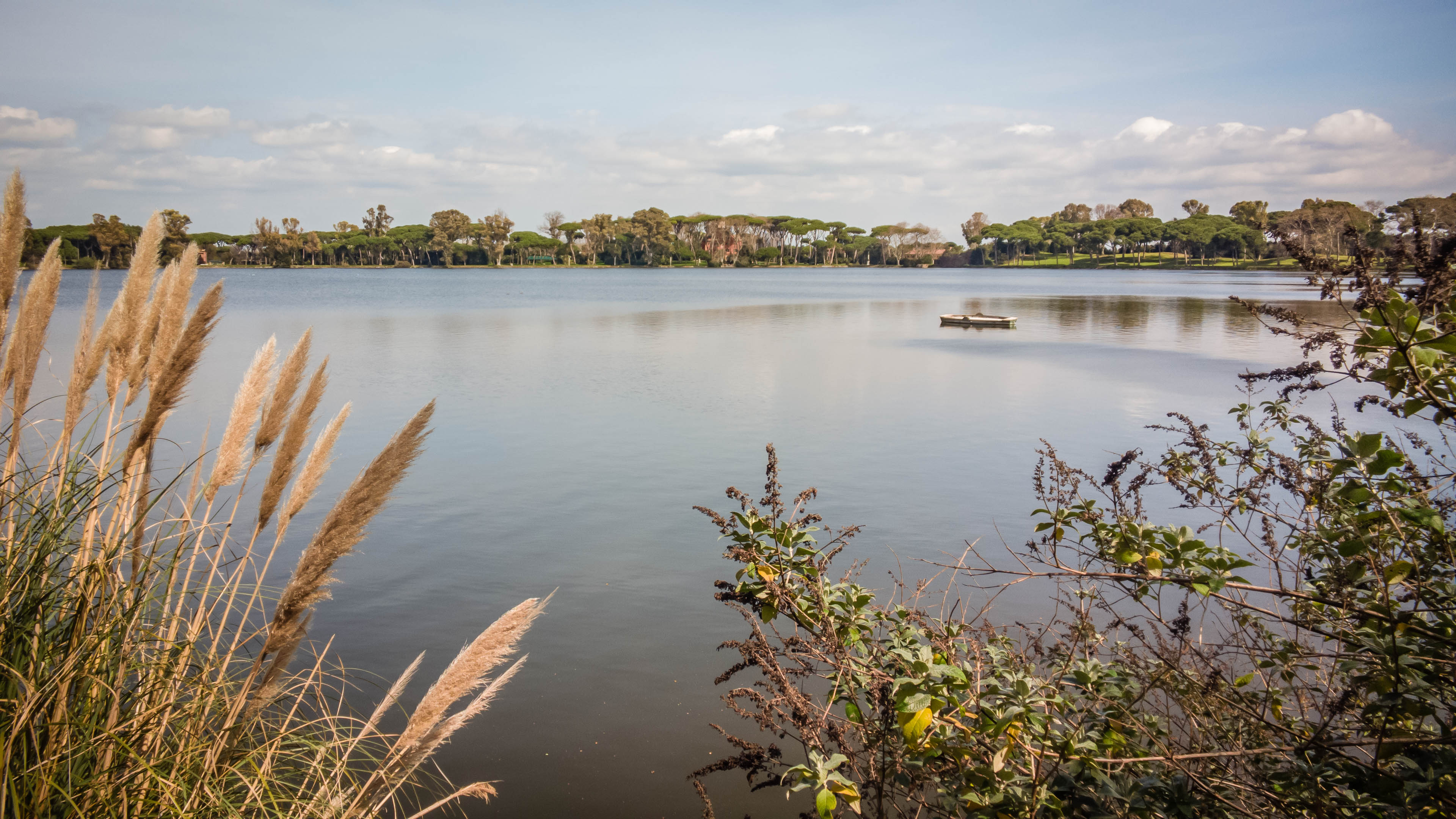 Oasi di Porto, Fiumicino, Lazio, Italia